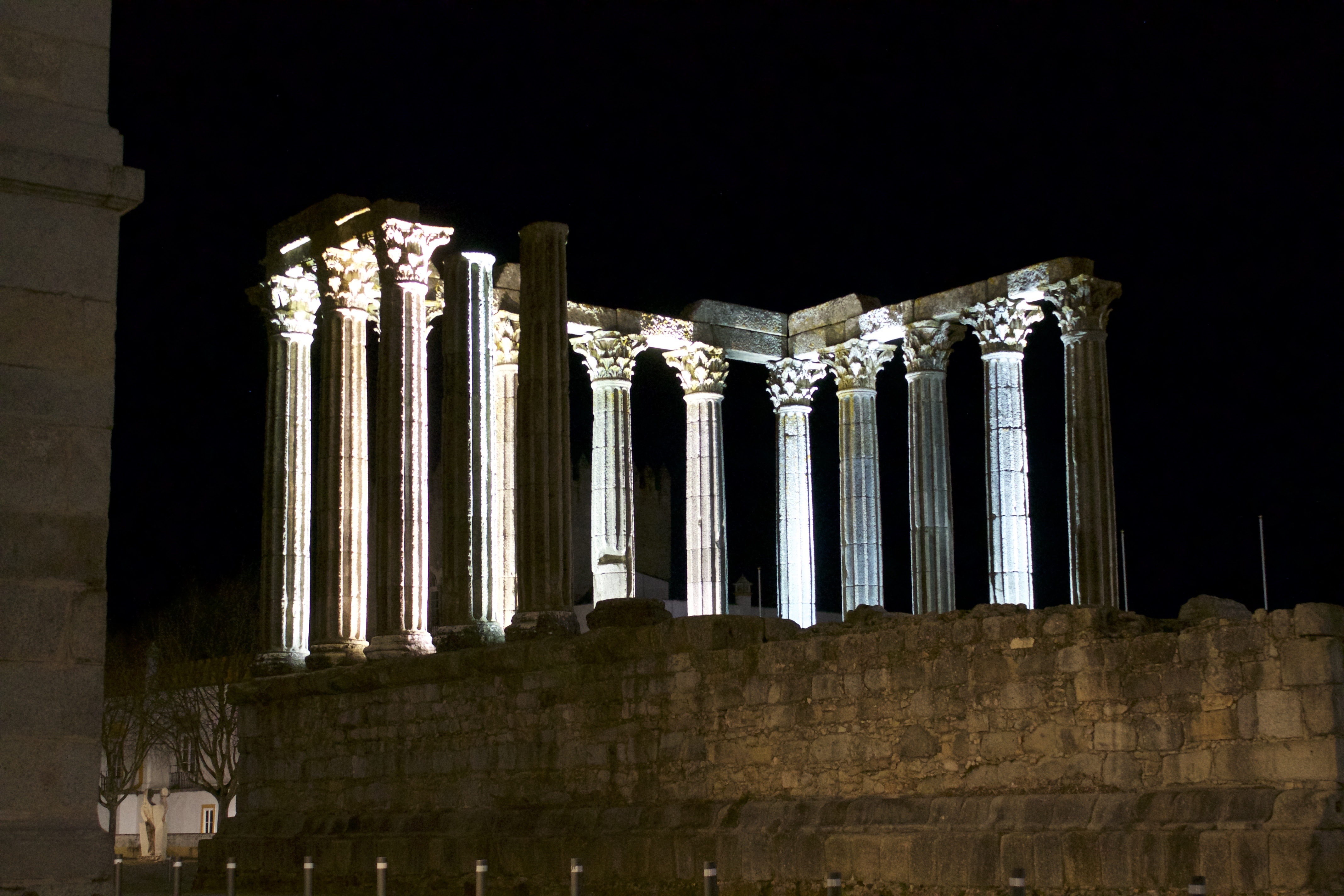 Evora